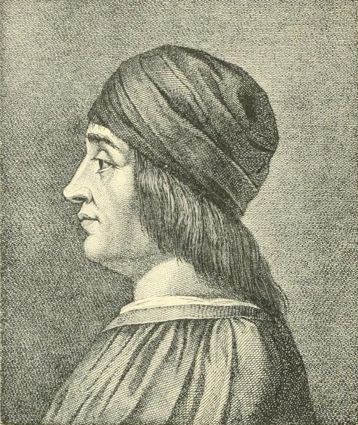 Ritratto di Matteo Maria Boiardo.